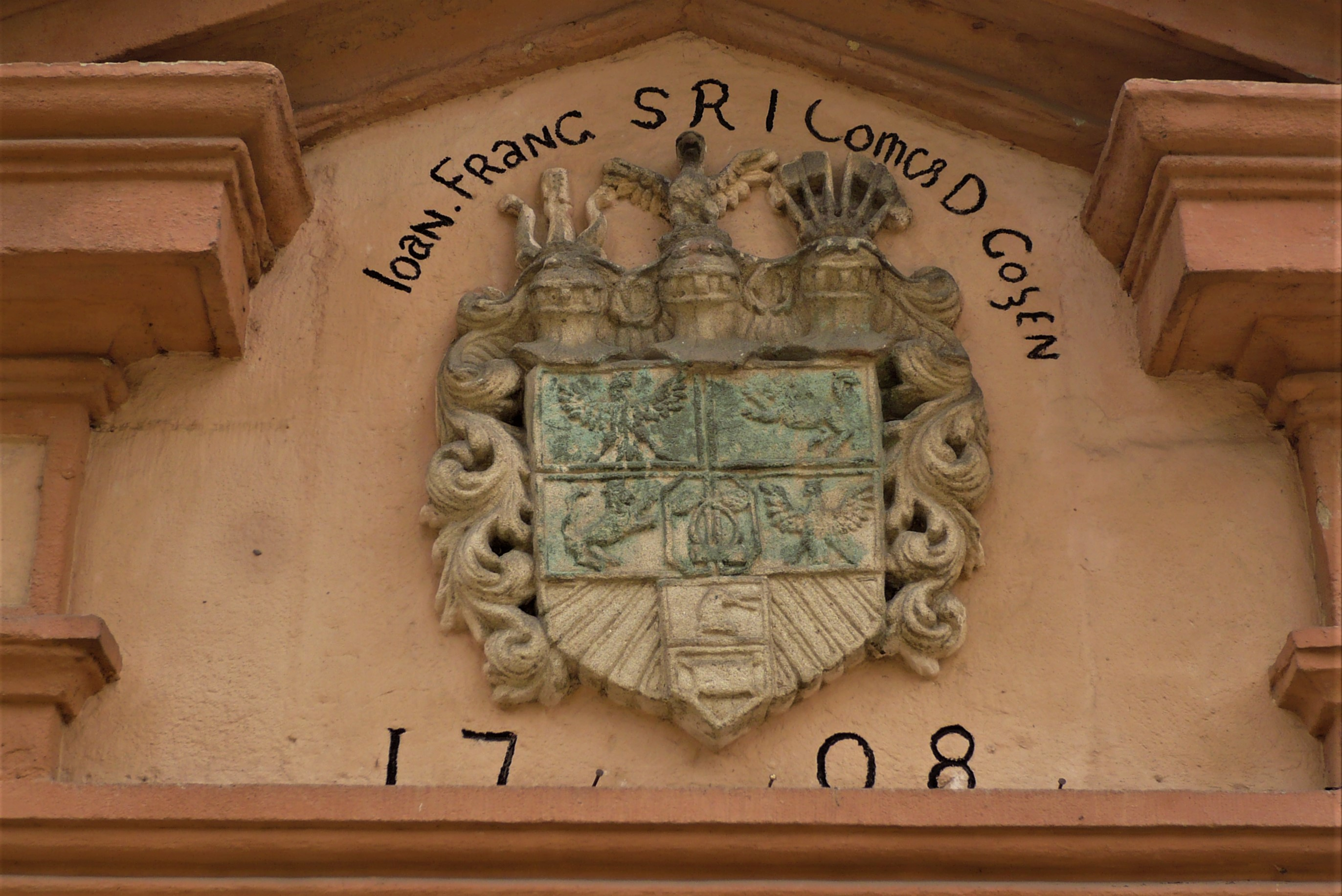 Herb Goetzenów w Bożkowie